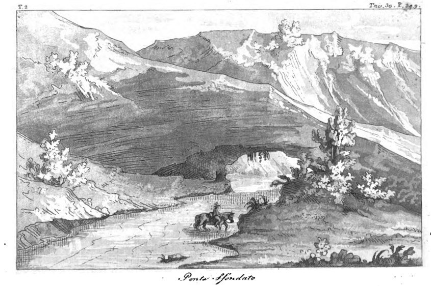 Disegno che raffigura il Ponte Sfondato, presso Montopoli in Sabina